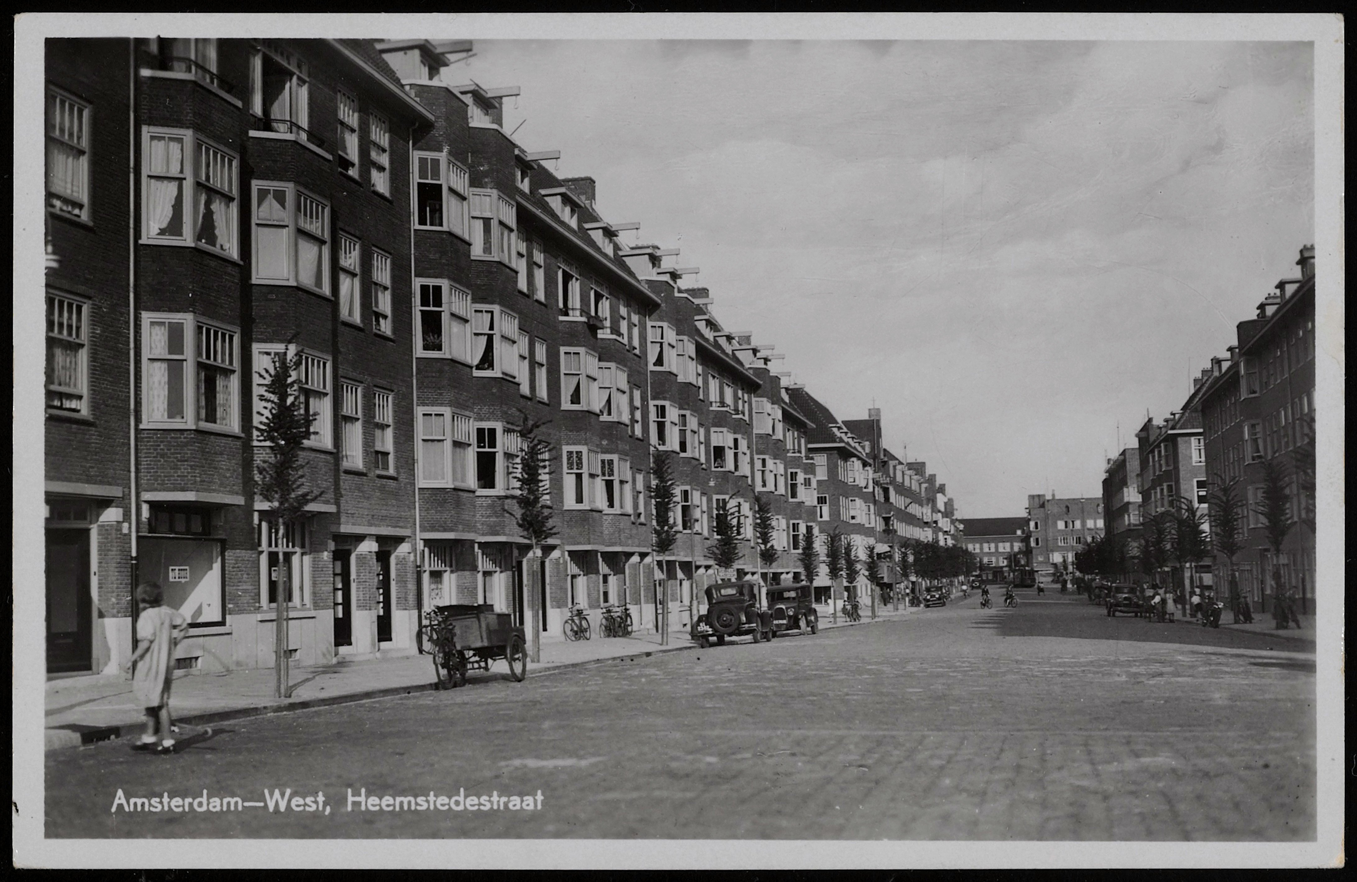 Beschrijving: HeemstedestraatUitgever S. Finsy & Zn, AmsterdamDocumenttype: prentbriefkaartCollectie: Collectie Stadsarchief Amsterdam: prentbriefkaartenDatering: 1928Geografische naam: HeemstedestraatInventarissen: PRKBB00094000001G